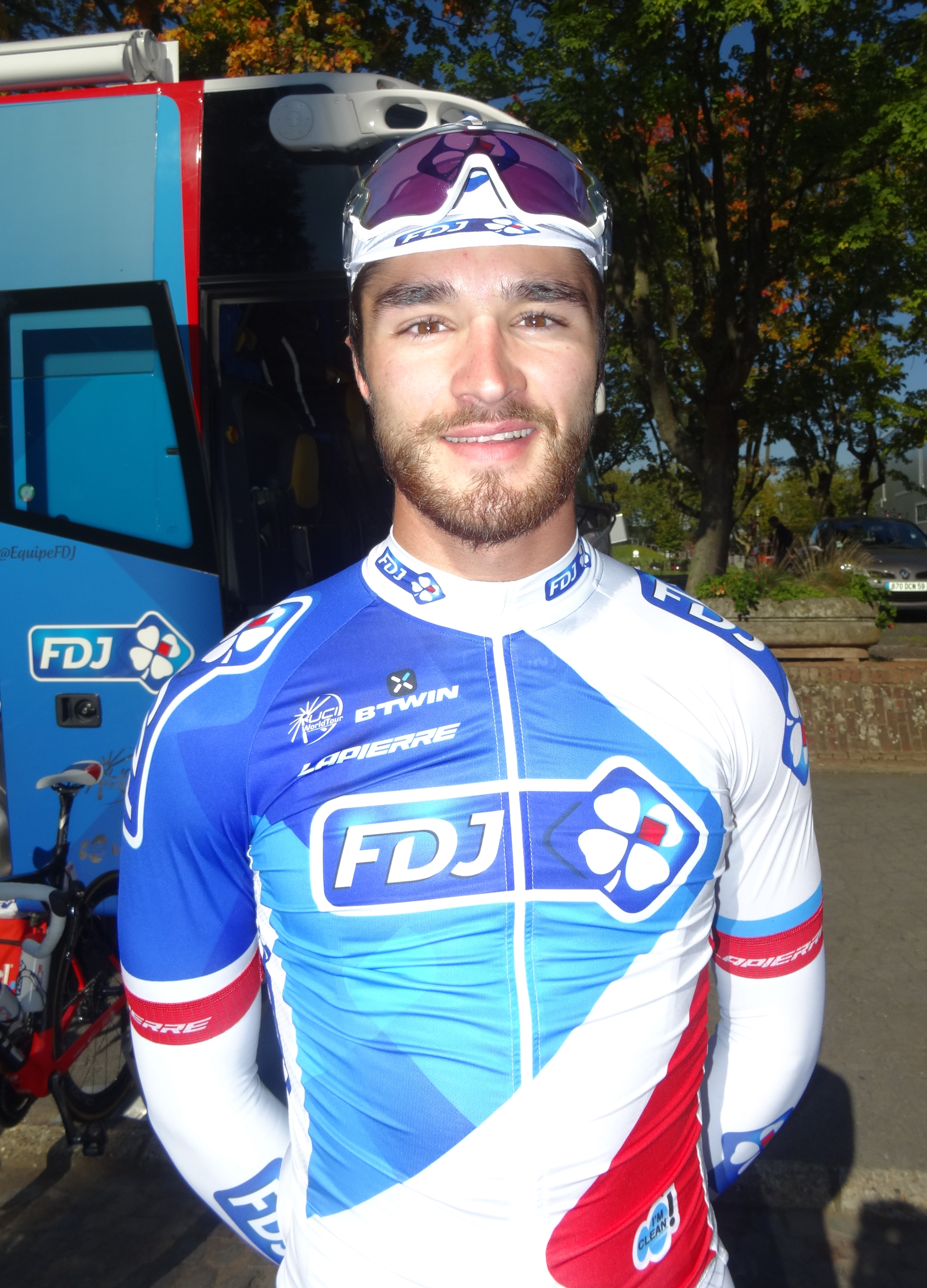 Reportage réalisé le vendredi 2 octobre à l'occasion de l'arrivée de la troisième étape de l'Eurométropole Tour 2015 à Roubaix, France.